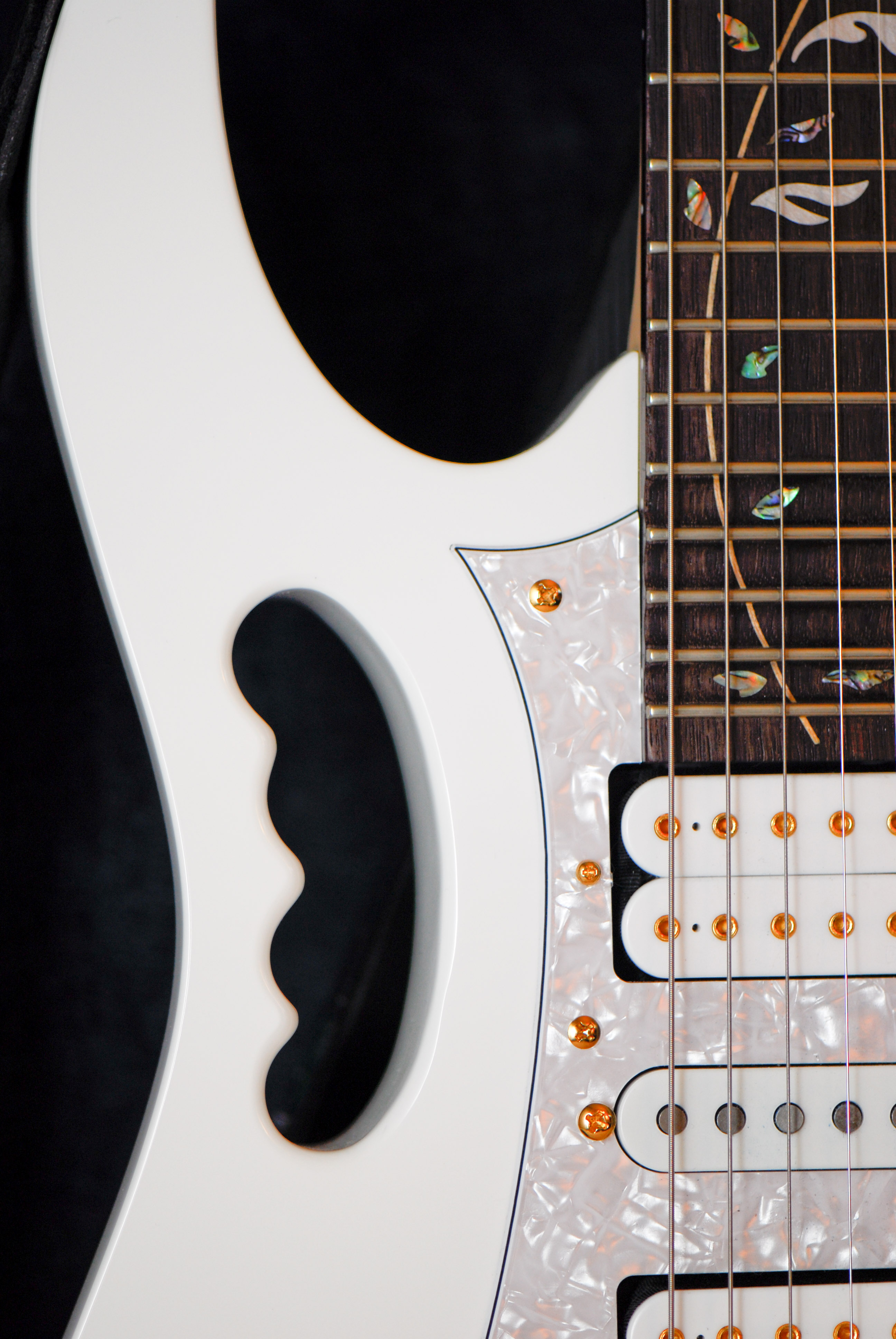 Ibanez JEM7V Steve Vai Signature Electric Guitar